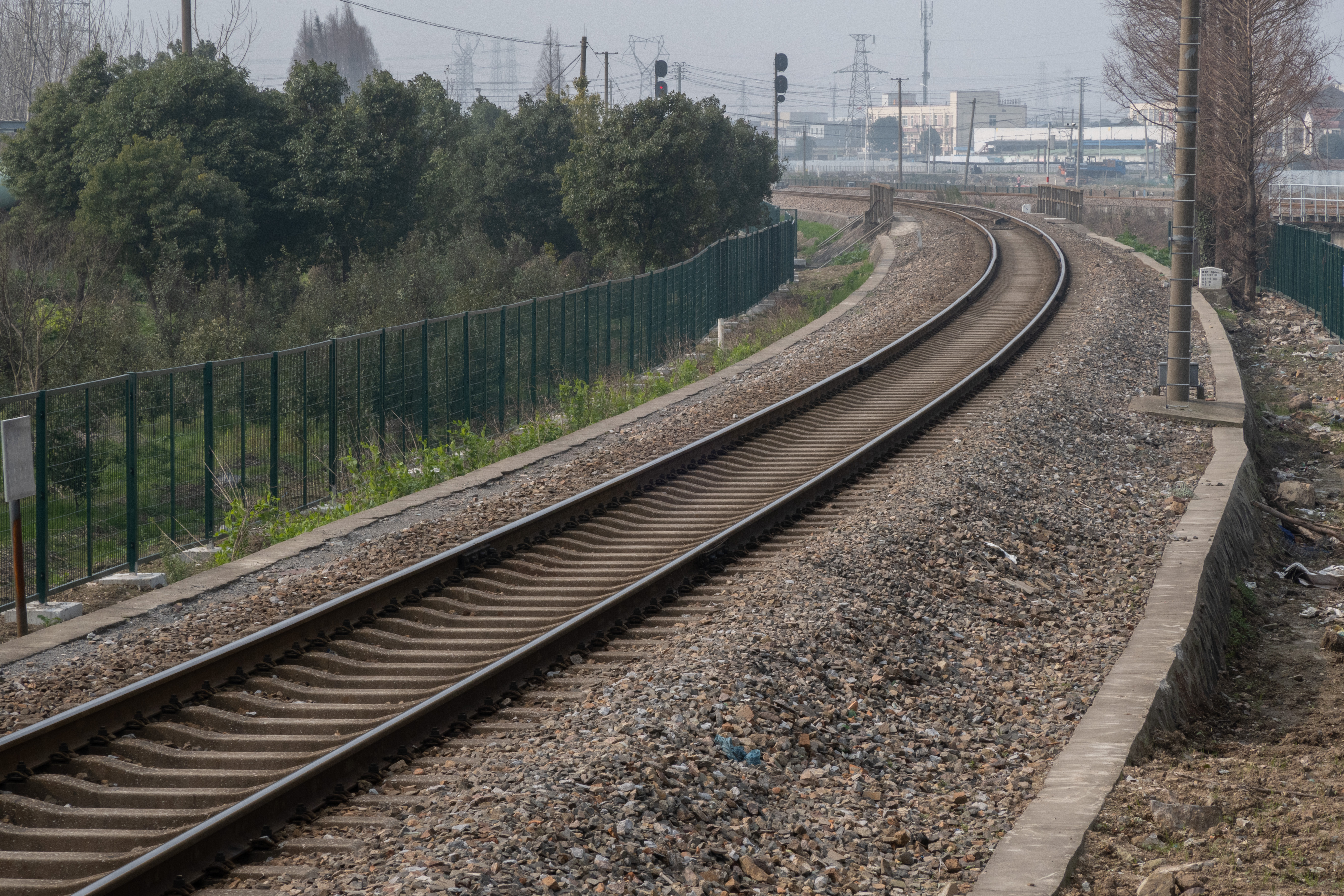 洪镇铁路镇海段